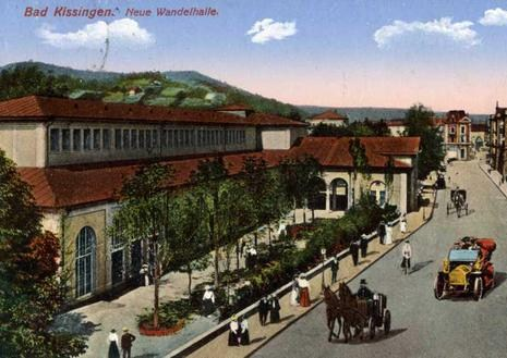 Die Wandelhalle im bayerischen Staatsbad Bad Kissingen, mit 3.240 m² die größte Trinkkurhalle der Welt (Außenansicht)